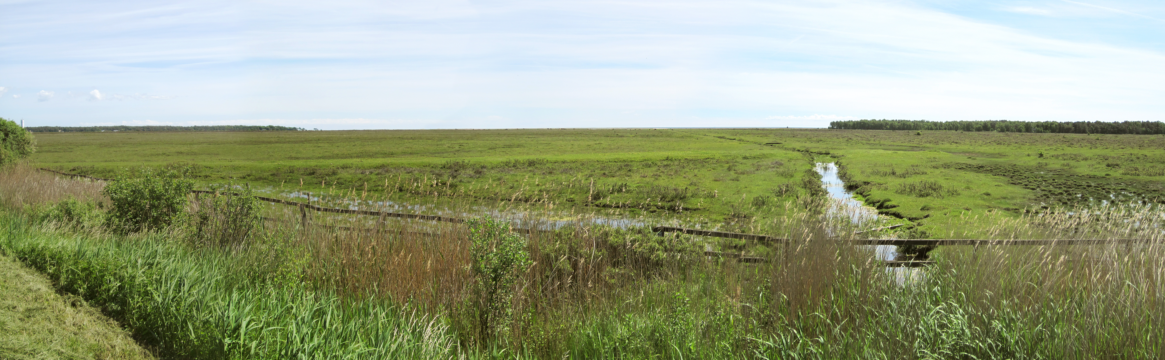 Ljungen på Falsterbonäset med Ammerännan.